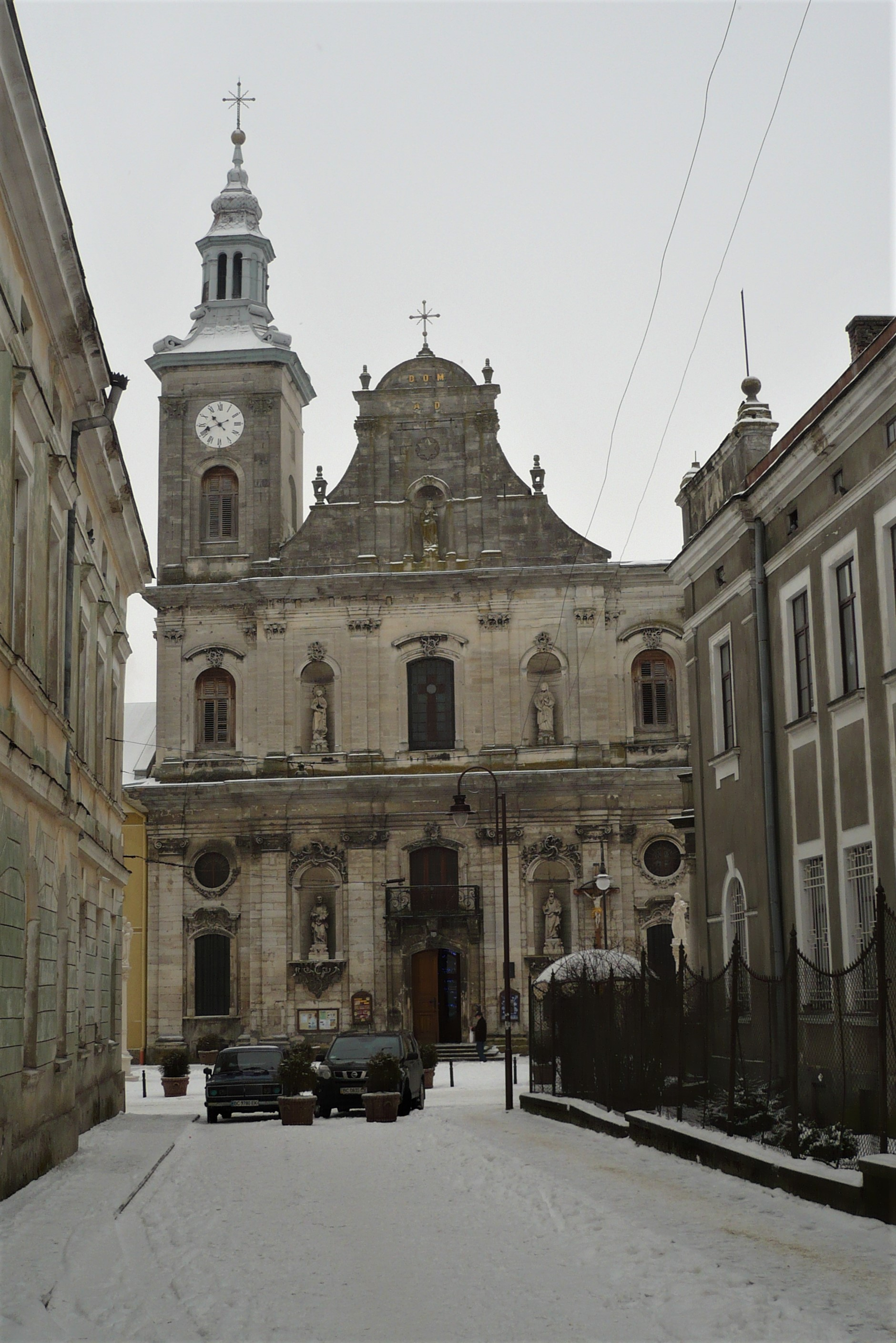 Kościół